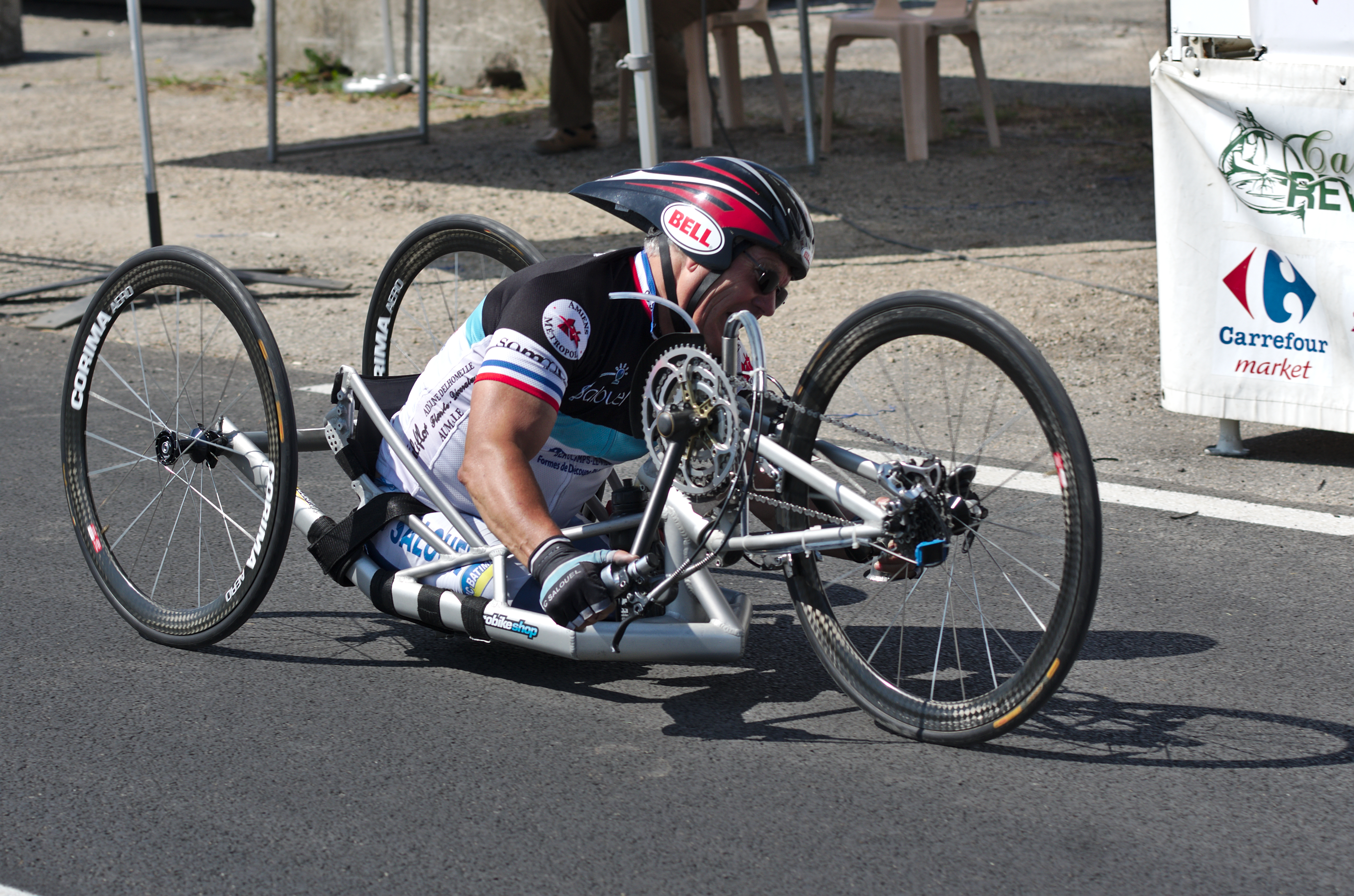 Championnat de France de cyclisme handisport - 20140615 - Contre la montre